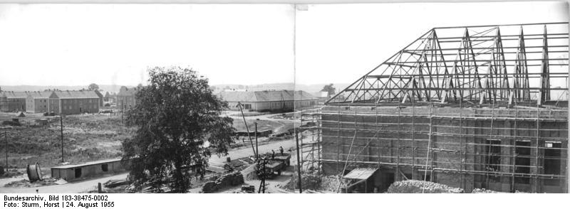 Mestlin, Blick über die Baumaßnahmen Zentralbild Sturm 24.8.1955 Zum 10. Jahrestag der demokratischen Bodenreform Das neue Gesicht des Dorfes Mestlin Seitdem durch die Durchführung der demokratischen Bodenreform 3 298 082 ha Land von ehemals 7160 Junkern und Grossagrariern an landarme Bauern, Landarbeiter und Umsiedler verteilt wurden, hat sich das Leben der Landbevölkerung in der Deutschen Demokratischen Republik immer reicher und glücklicher gestaltet. Auch in Mestlin (Kreis Parchim), einem alten mecklenburgischen Dorf, ist der Wohlstand eingezogen und der Bergermeyer, ehemaliger Besitzer des Mestliner Gutes, würde das Dorf und seine "Taglöhner" nicht wiedererkennen. Mestlin wurde zu einem grossen Bauplatz. Neben den ehemaligen Katen entstanden noderne zweistöckige Wohnhäuser, neben den baufälligen Scheinen ein Landambulatioium und ein Kulturhaus. Die Mütter geben ihre Kinder in den herrlichen Kindergarten und die Kinderkrippe. Das Vieh der Genossenschaftsbauern ist in modernen Stallungen untergebracht und die MTS Mestlin ersetzt mit ihren modernen Maschinen wertvolle Menschenkraft. UBz: Blick auf den neu entstandenen Dorfteil Mestlins. (Rechts im Vordergrund) Das neue Kulturhaus. Vor wenigen Tagen wurden die Arbeiten an der 240 Tonnen schweren Dach-Stahlkonsturktion beendet. Mit Riesenschritten geht nun der Bau seiner Vollendung entgegen. Schon bald wird es das Zentrum des kulturellen Lebens für Mestlin und Umgebung sein. (Mitte Hintergrund) Die großzügige Anlage des Kinderhauses, das Kindergarten und Kinderkrippe aufnahm. (Links) Neue Wohnhäuser, in deren 2- bis 4-Zimmerwohnungen 58 Familien von Traktoristen, von Angehörigen des Landambulatoriums sowie von Genossenschaftsbauern usw. leben.